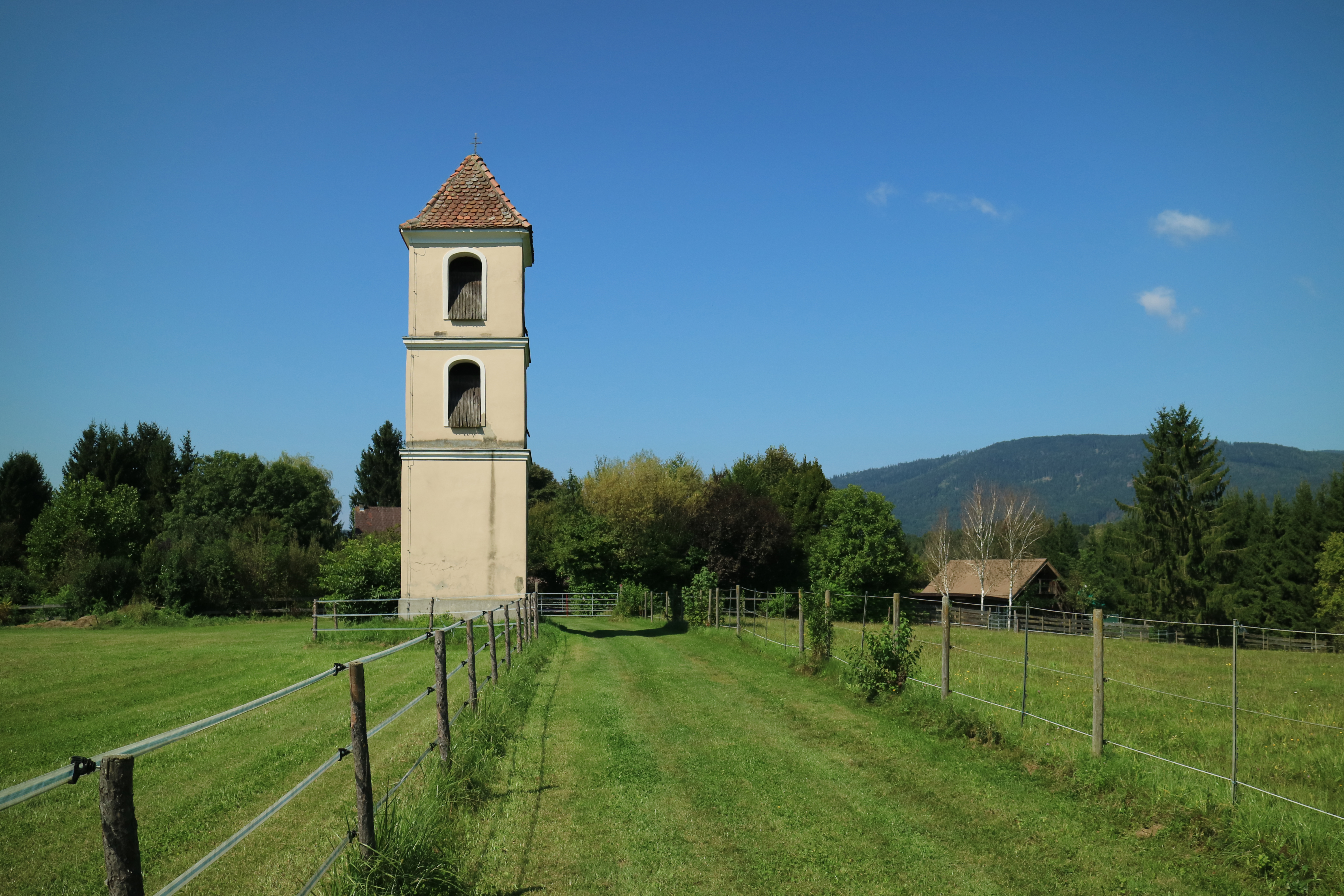 Wetterturm im Ortsteil Niederschöckl, Gemeinde Weinitzen (Steiermark)